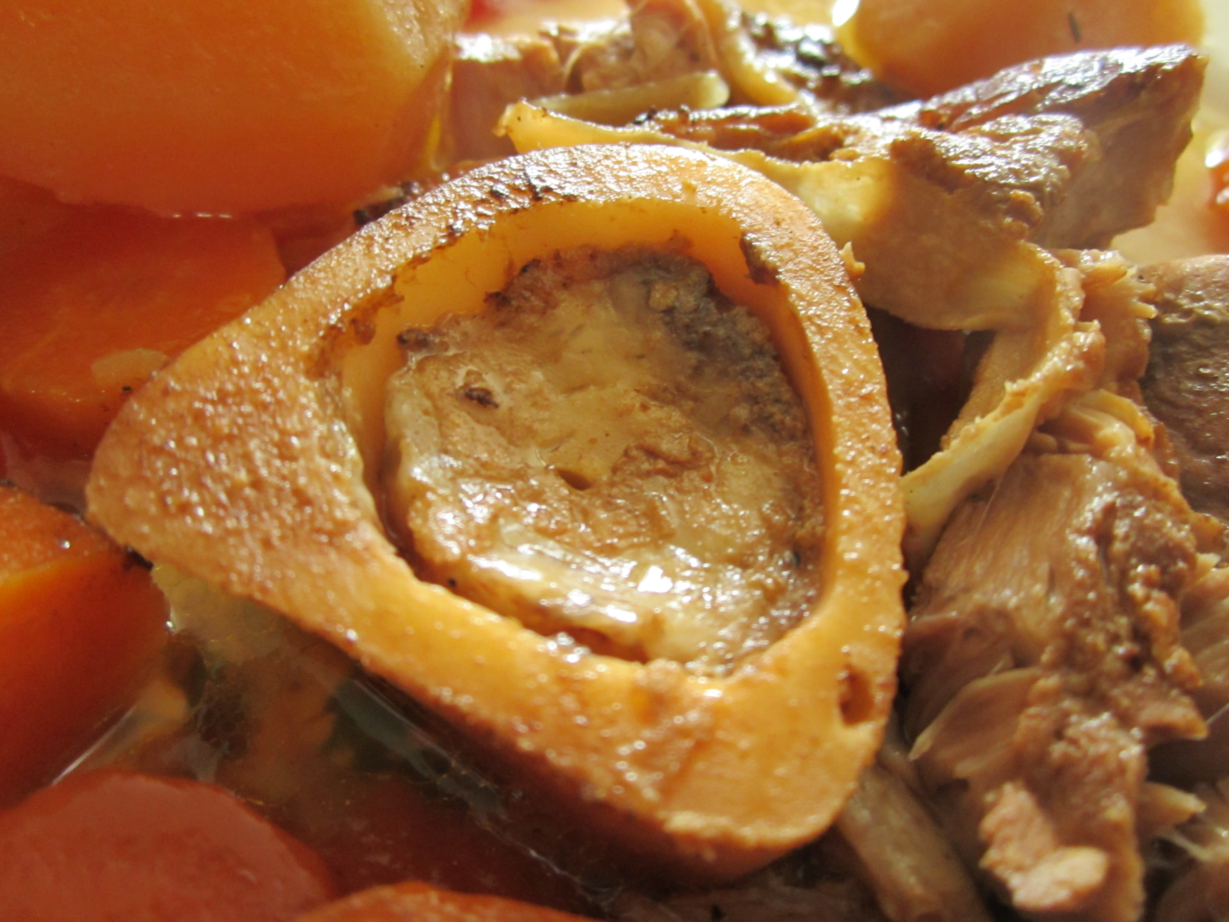 os à moelle